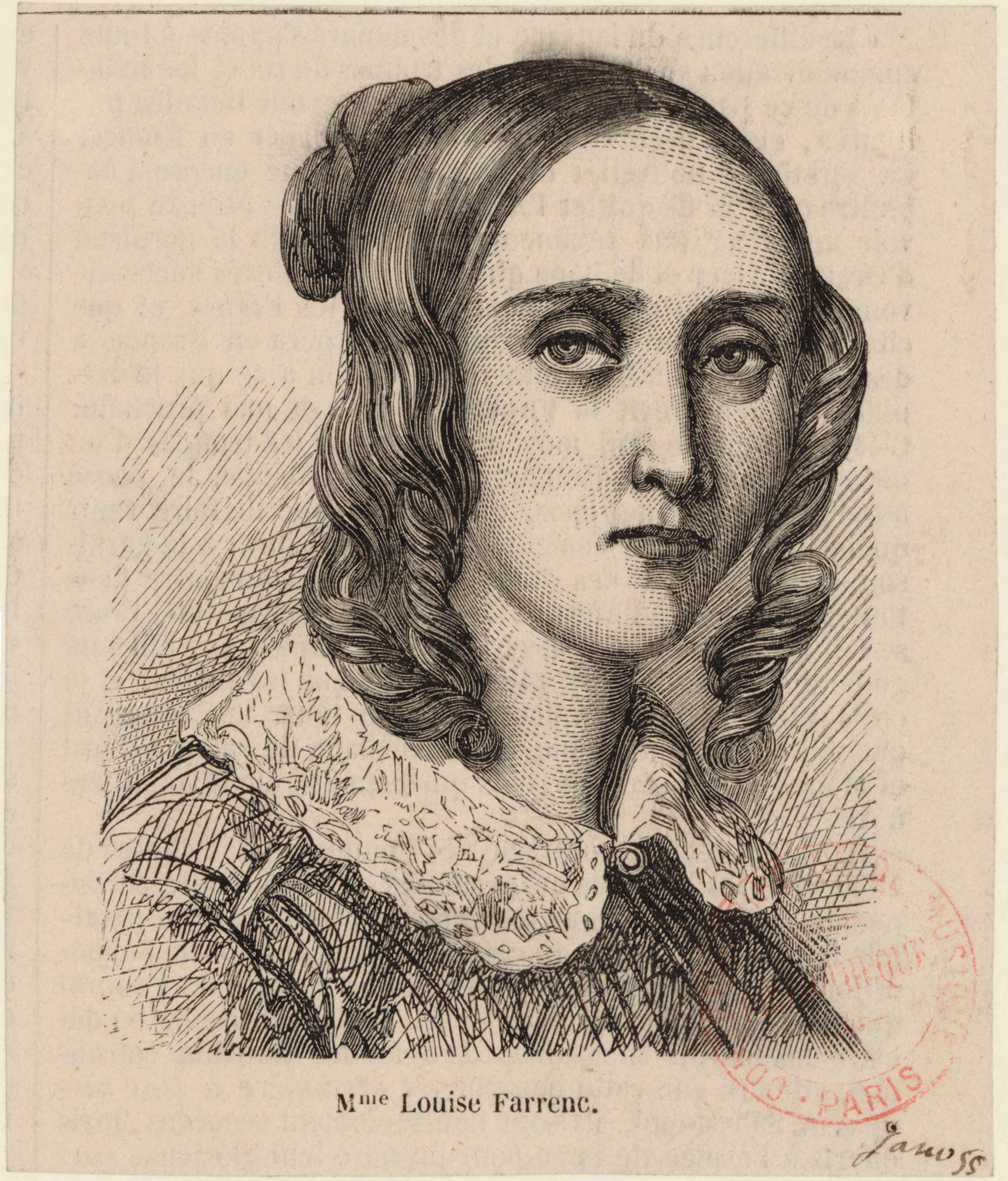 Louise Farrenc (née: Jeanne-Louise Dumont) (1804-1875), French composer